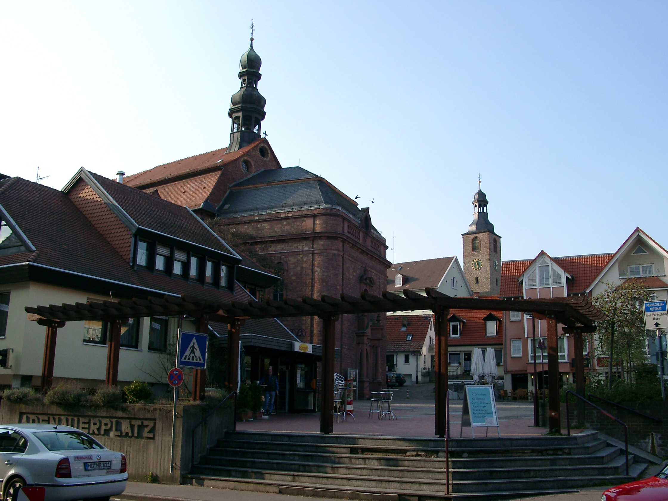 Wiesloch, Adenauerplatz und Kirche der Katholischen Kirchengemeinde St. Laurentius